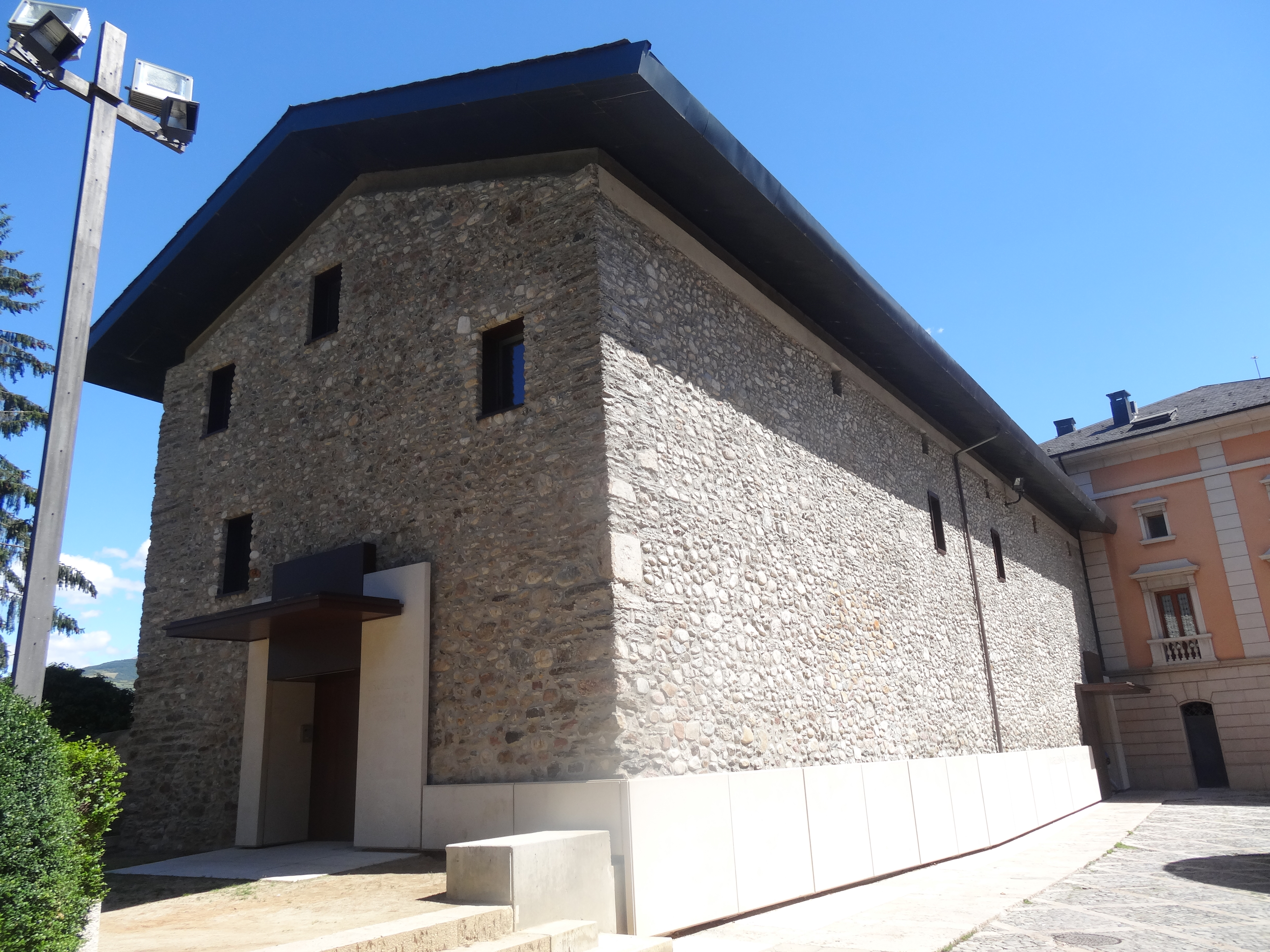 Urgellensis Ecclesiae Archivia - Arxiu del bisbat de la Seu d'Urgell, darrera la catedral.